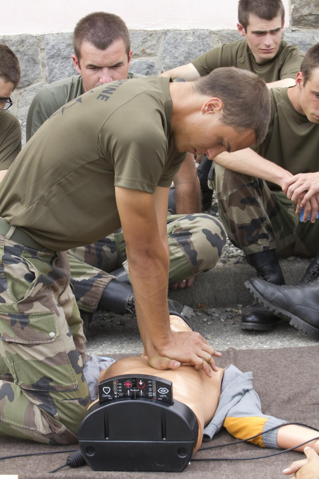 École polytechnique, élèves pendant la formation militaire initial au camp militaire de La Courtine, réanimation cardio-pulmonaire.